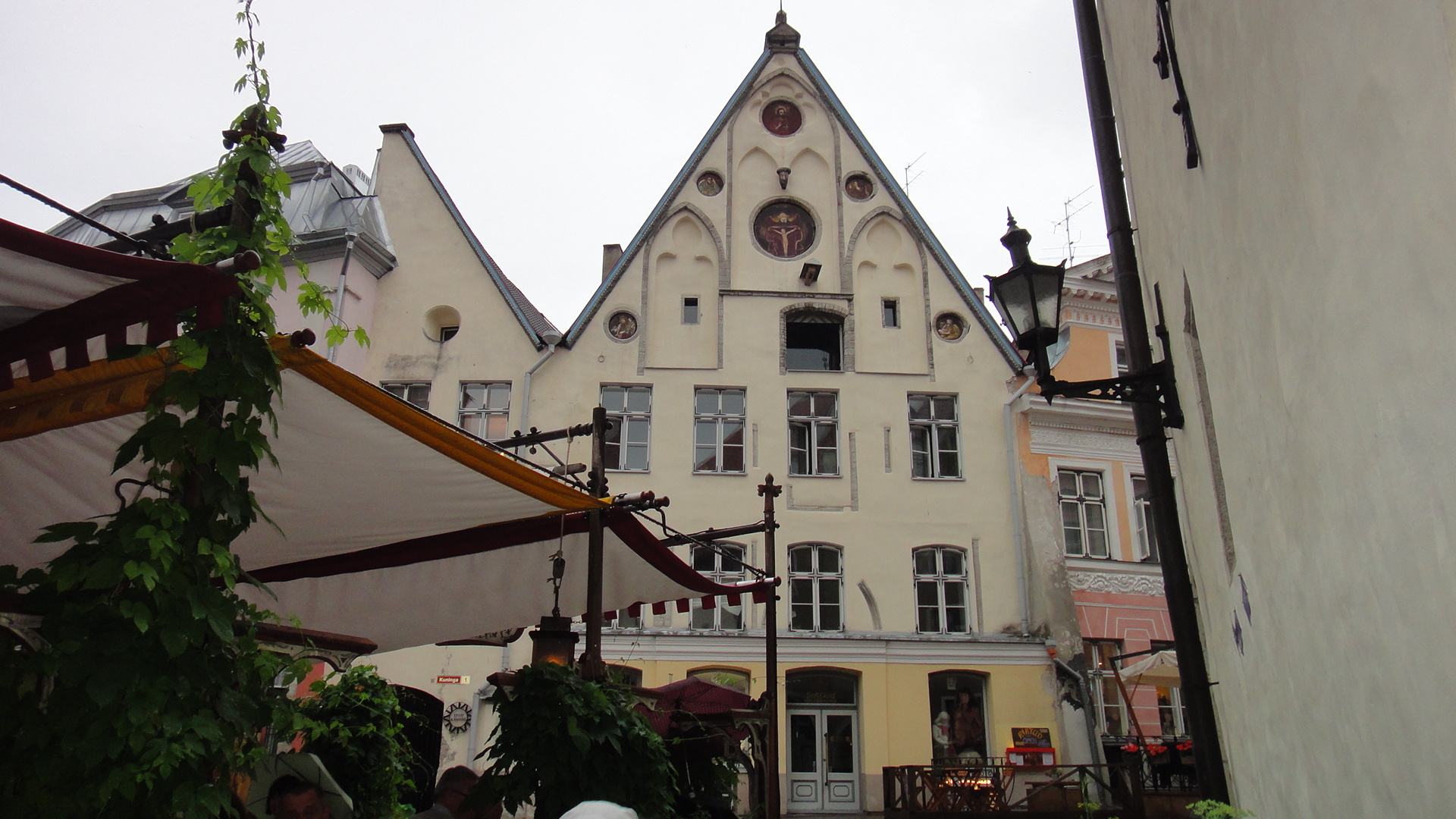 Арихитектурный комплекс "Отец и сын"